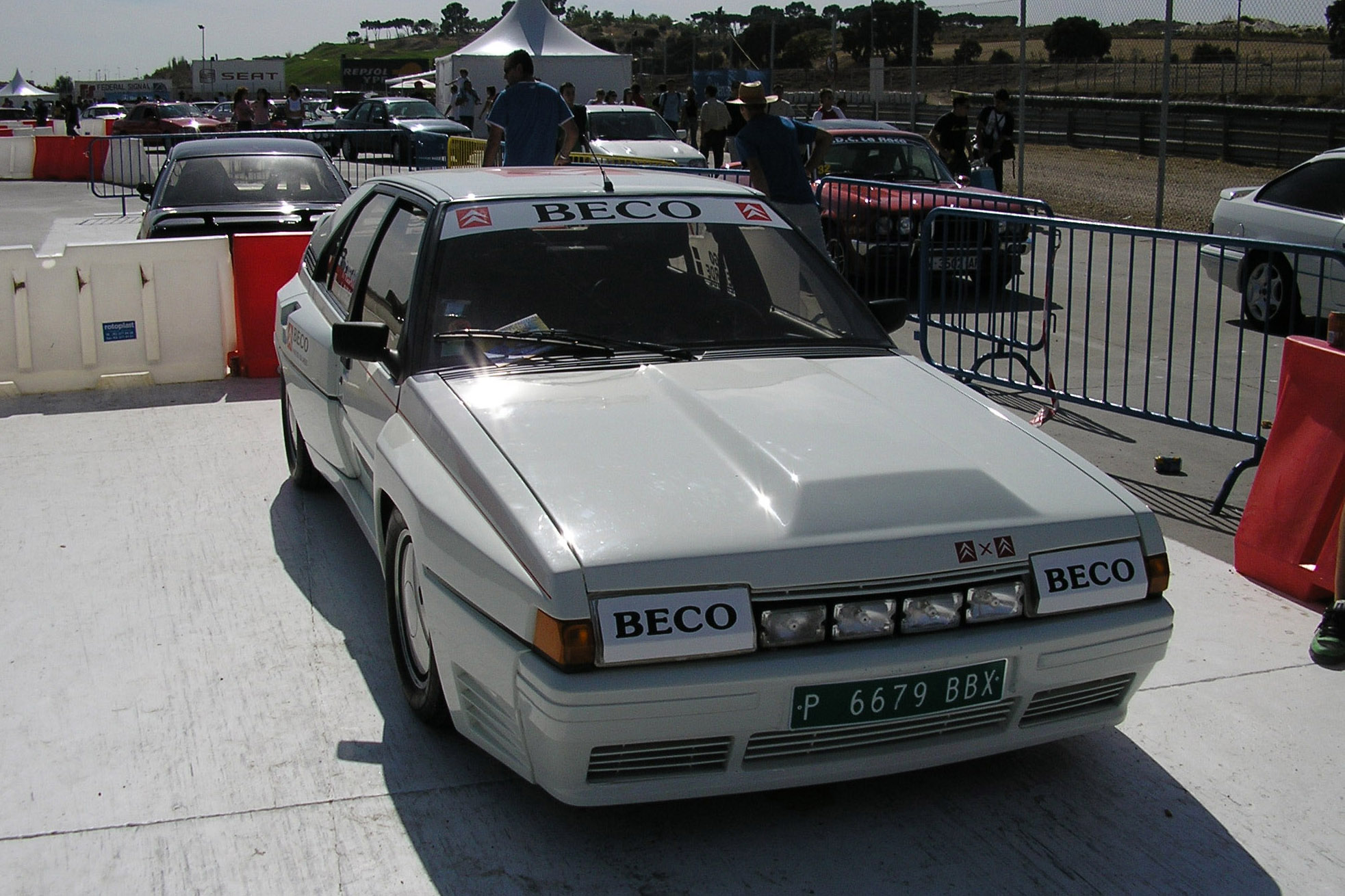 Citroën BX 4TC shown in Circuito del Jarama (Madrid). Jornada de puertas abiertas 2006.